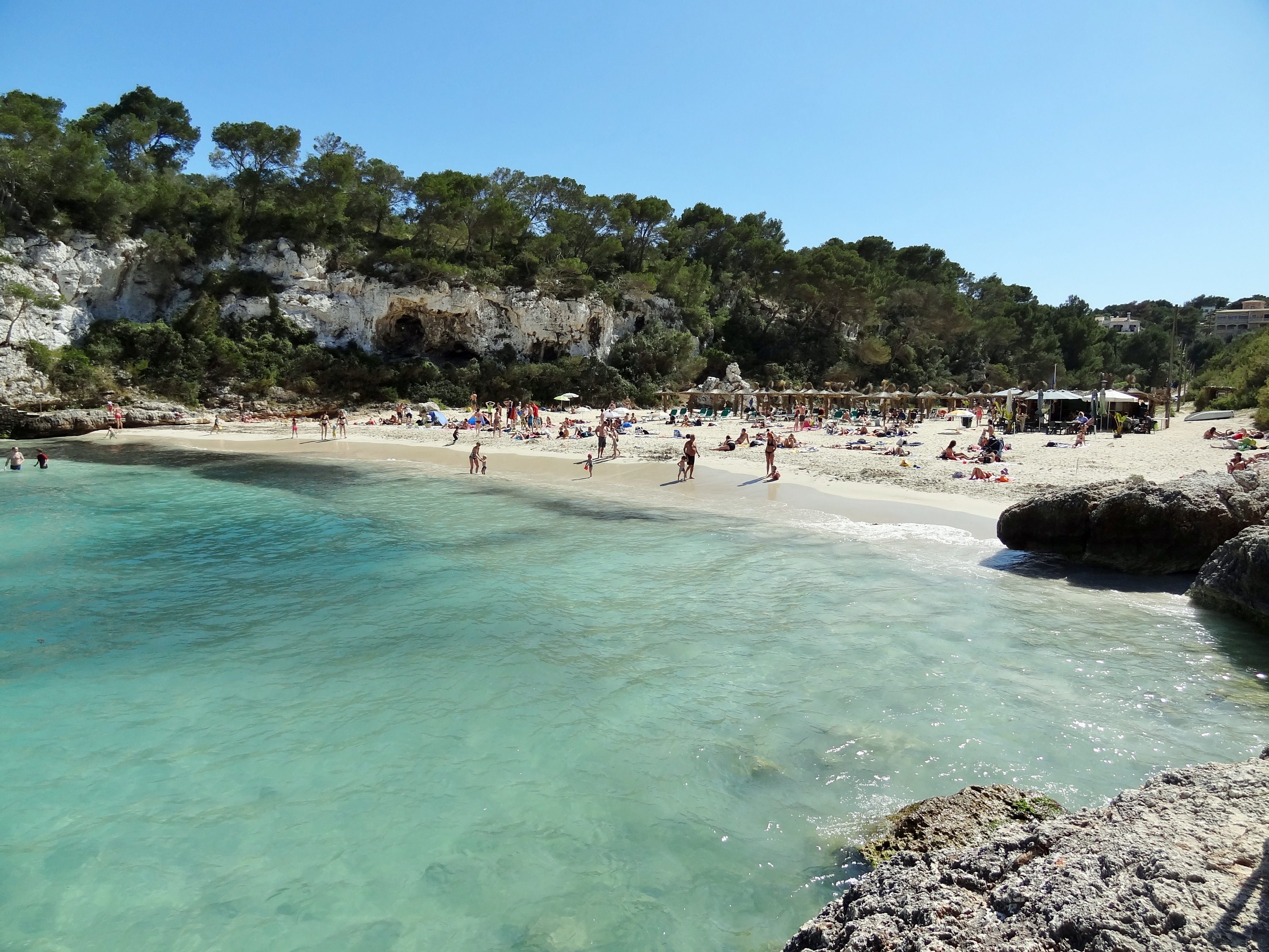 Cala Llombards, Gemeinde Santanyí, Mallorca, Spanien